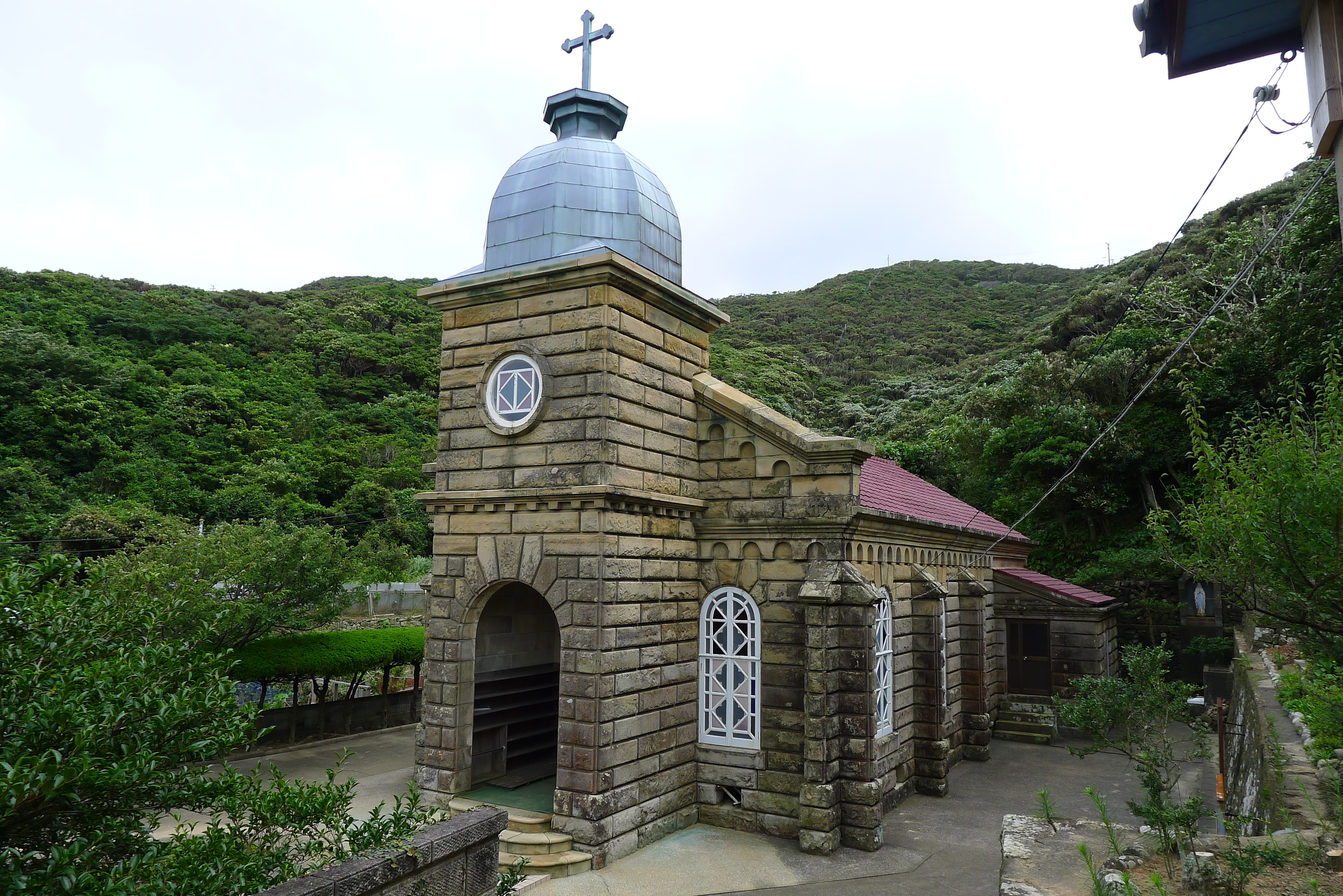 頭ケ島天主堂